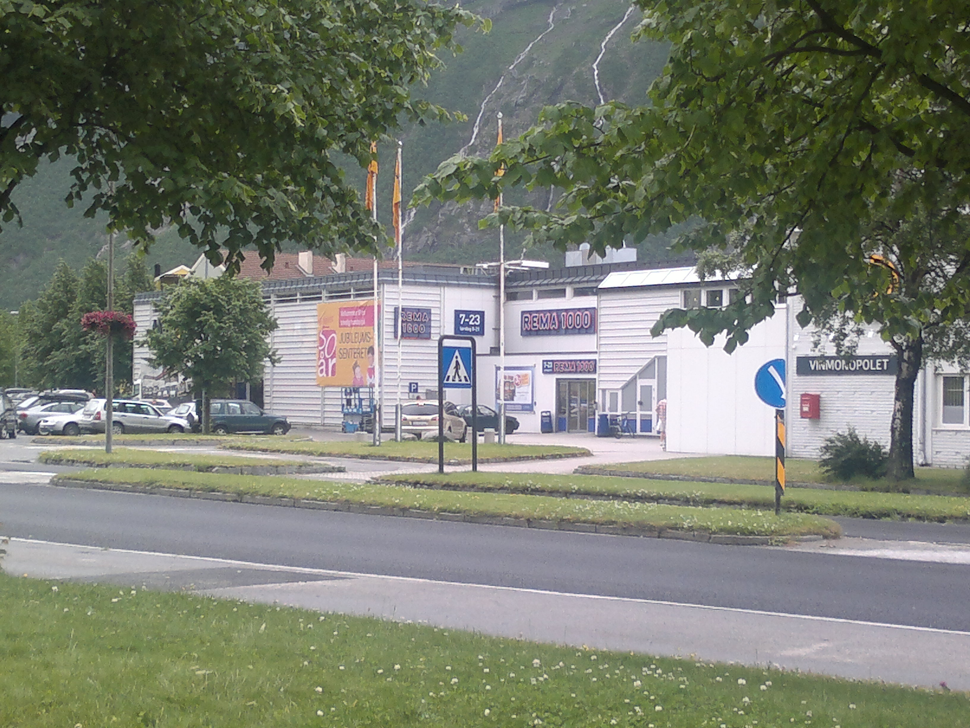 Rema 1000 -kauppa Sunndalsørassa, Sunndalissa, Møre og Romsdalin läänissä, Norjassa.